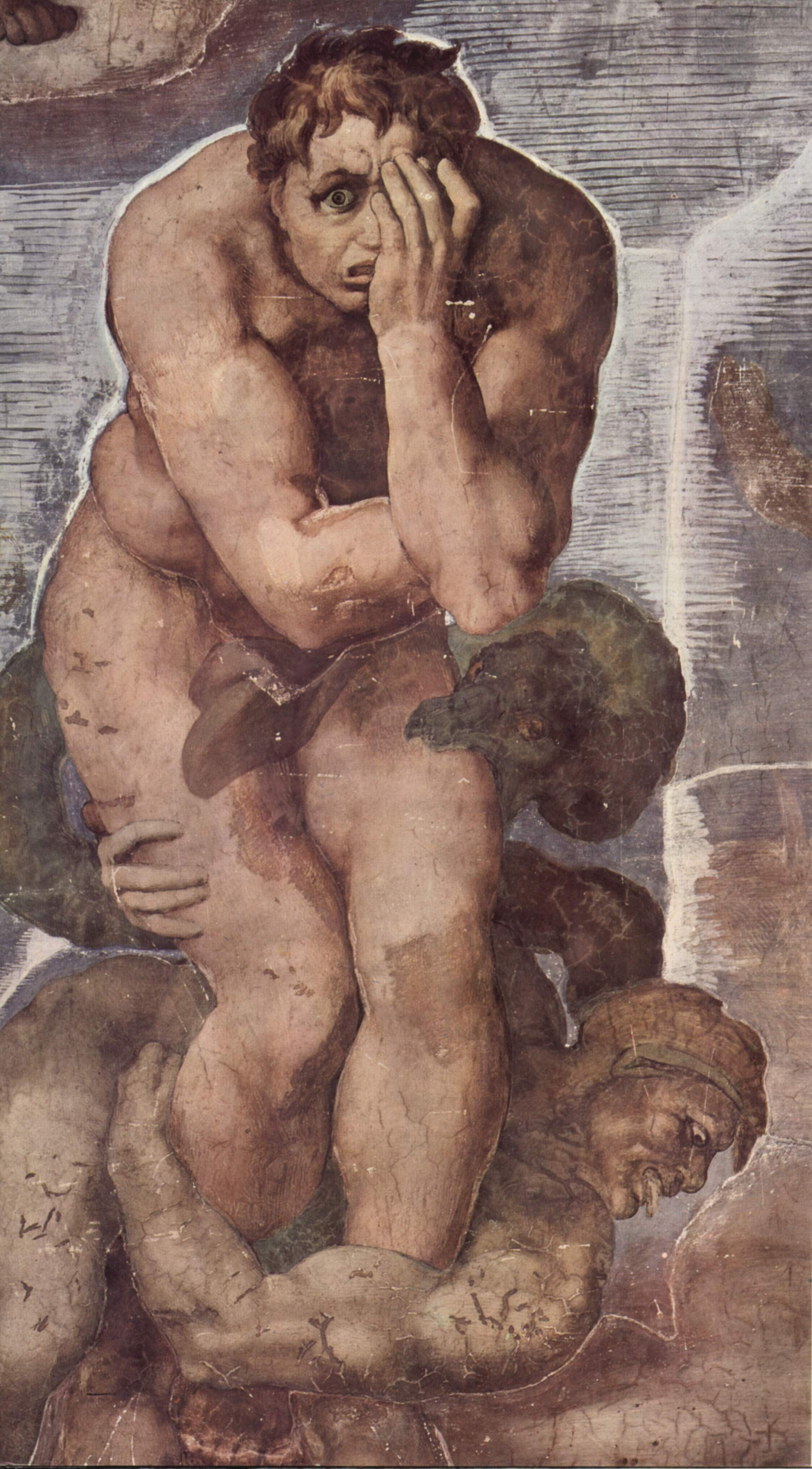 Detail: Verdammter mit Figuren der Unterwelt (unten rechts)